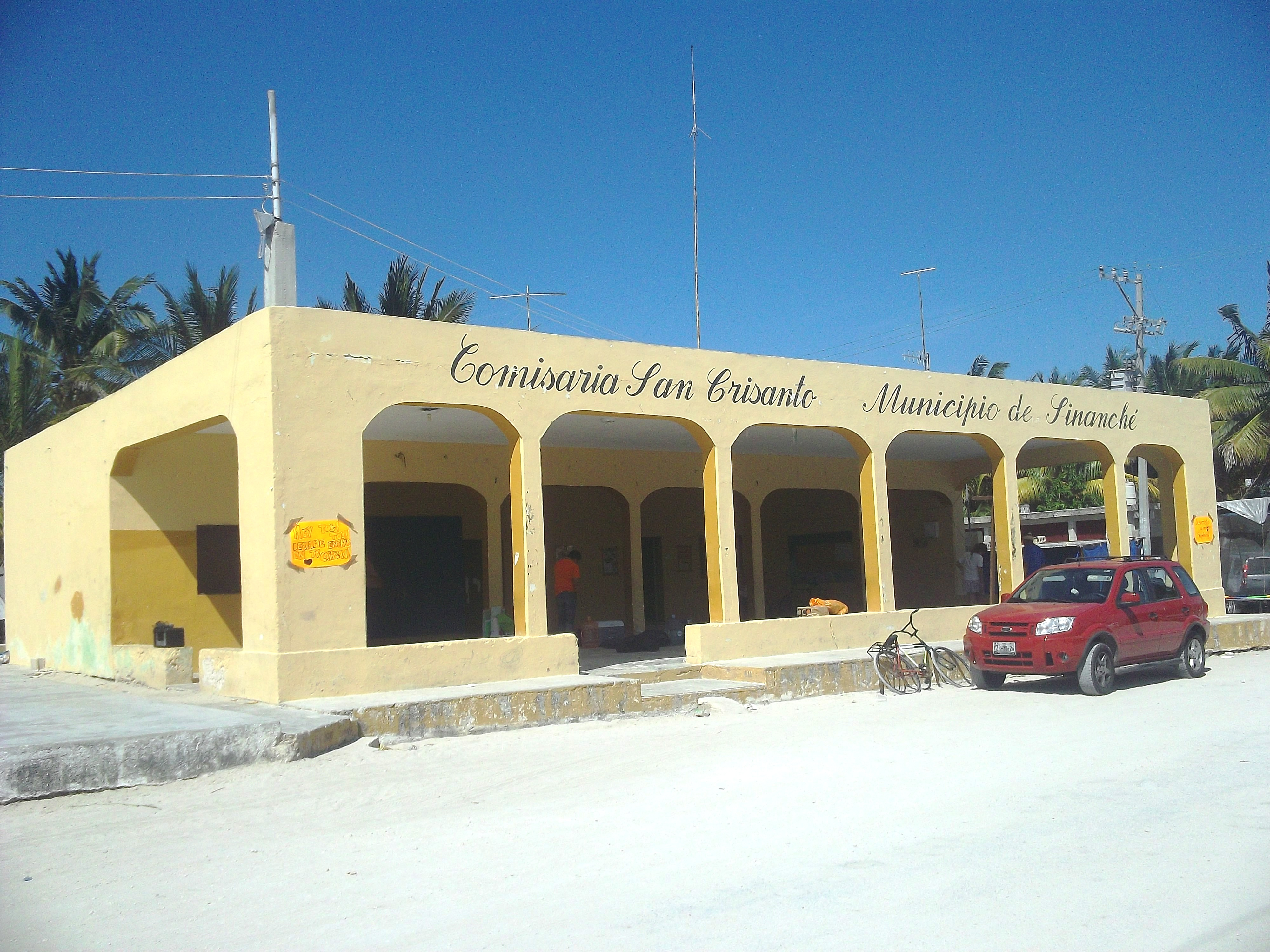 Casa comisarial de San Crisanto, Yucatán.